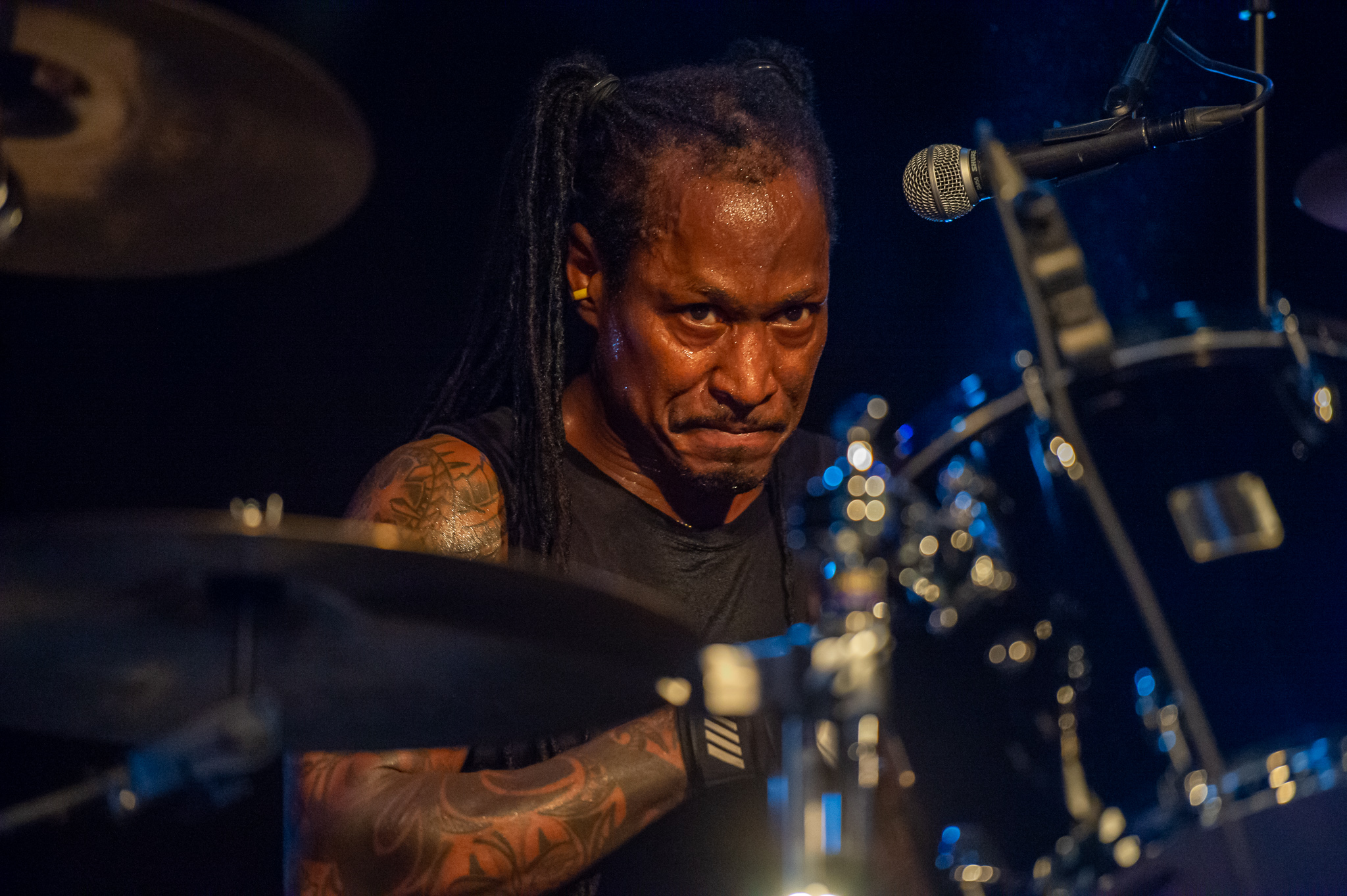 Concertbüro Franken,D. H. Peligro,Darren Henley,Dead Kennedys,Der Hirsch,Konzert,Livekonzert,Livemusik